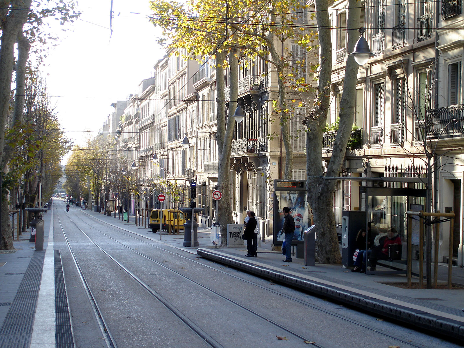 La ligne 2 du tramway de Marseille, boulevard Longchamp, France.